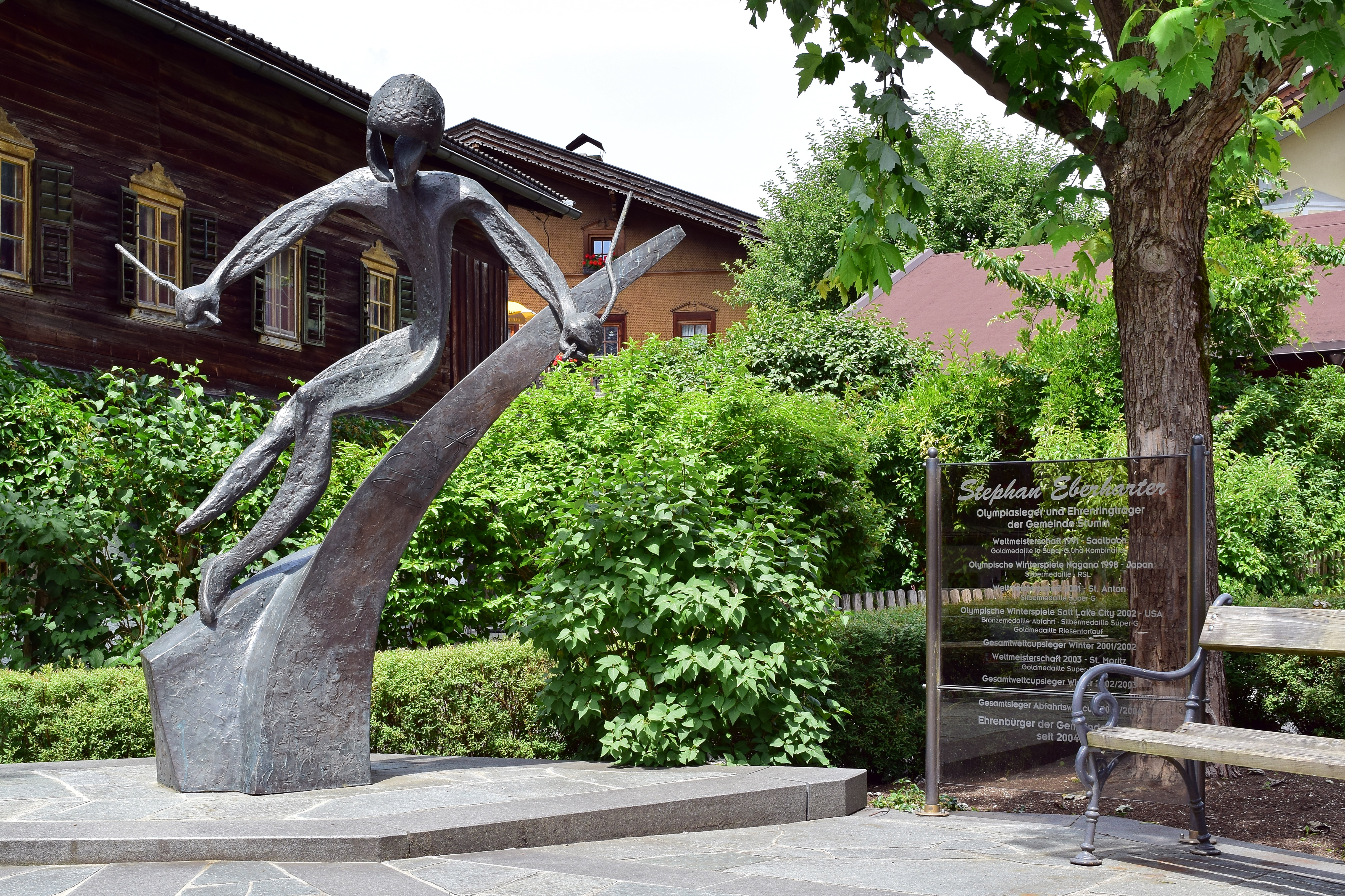 Denkmal für Stephan Eberharter in Stumm